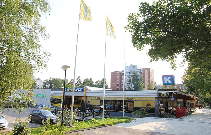 Vantaan Pähkinärinteen ostoskeskus. Huom: Muista säilyttää viittaus kuvaajaan, mikäli käytät kuvaa.